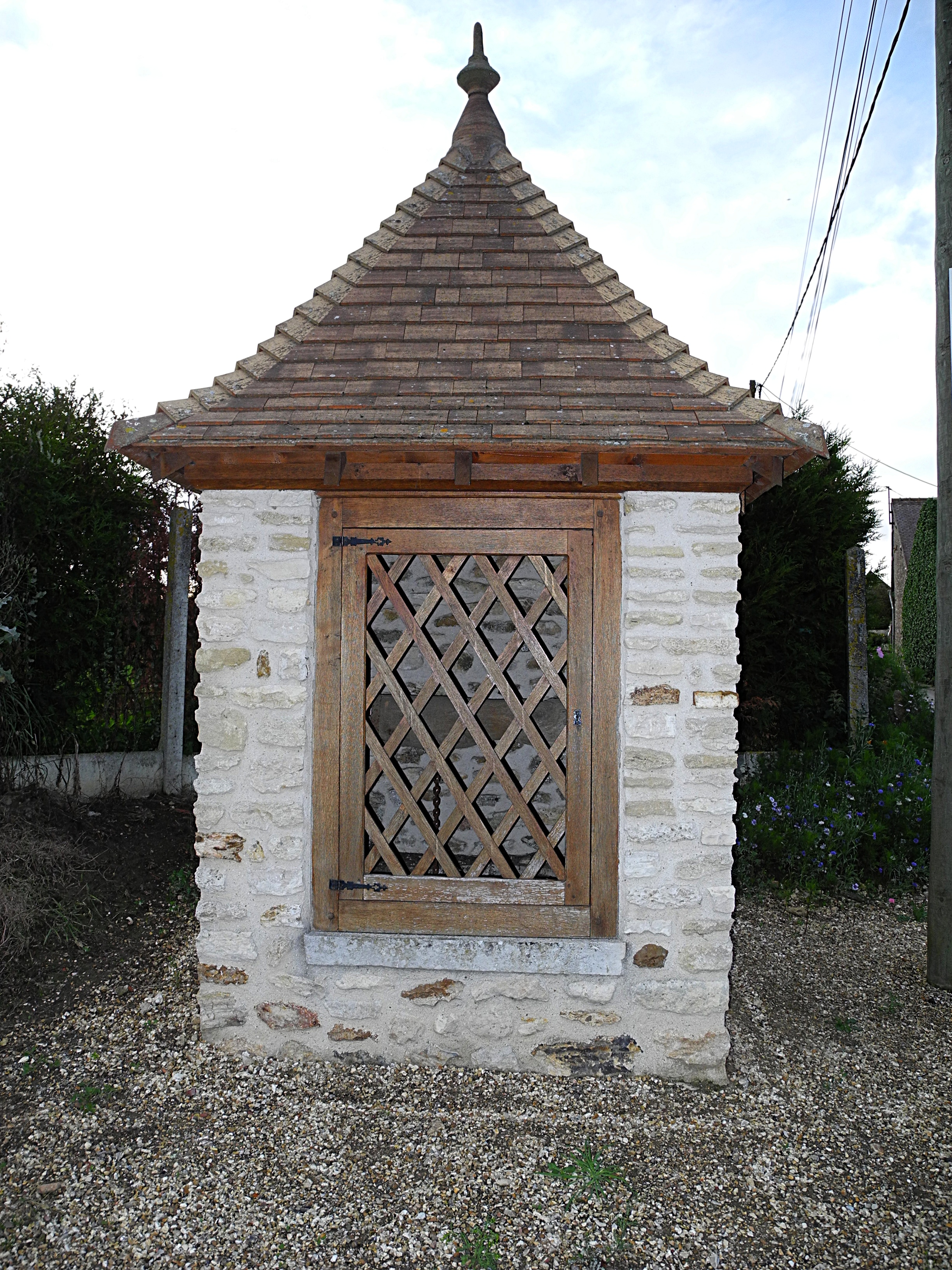 Puits à Chaignes (Eure)